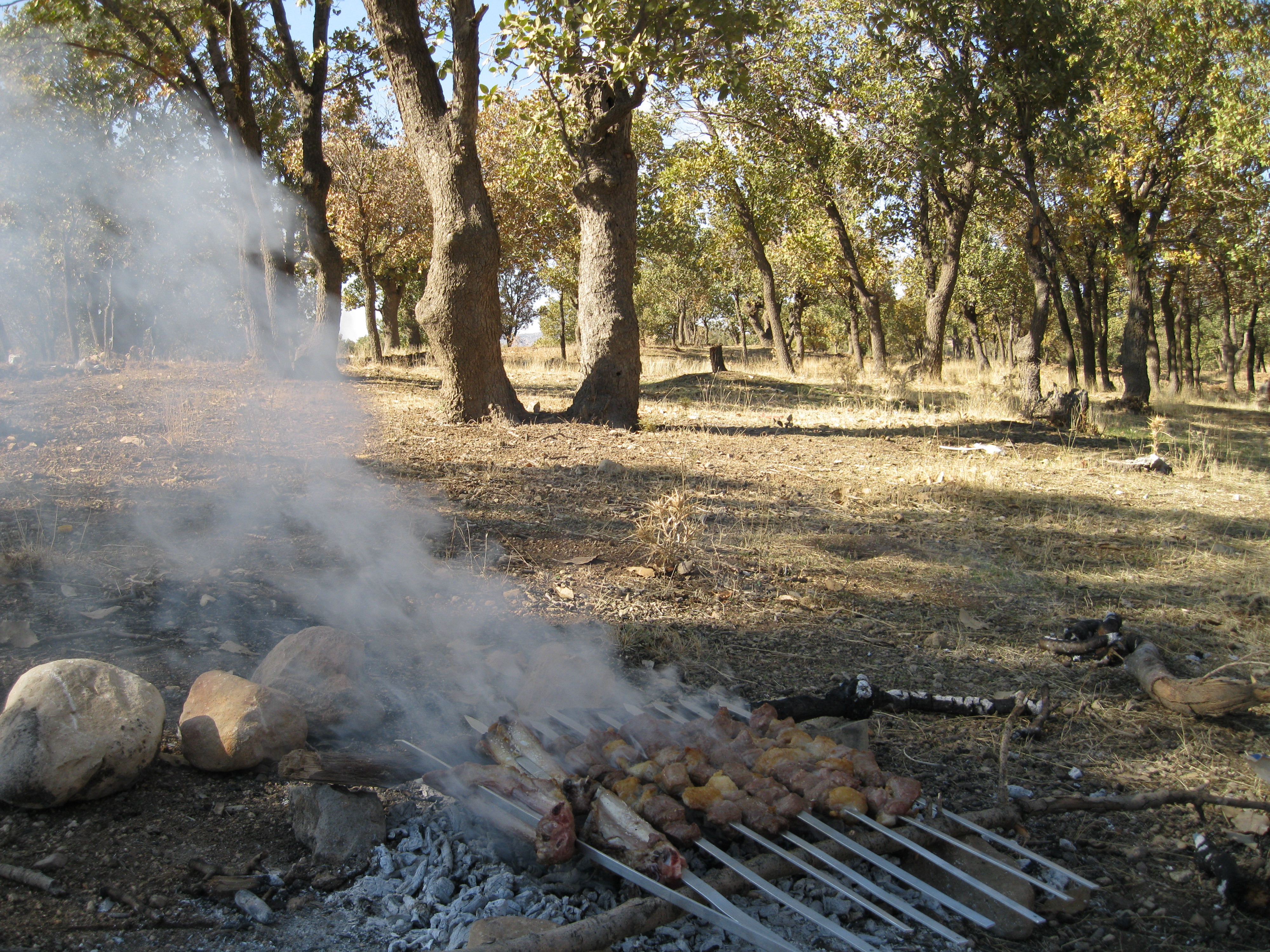 پخت کباب چنجه و دنده کباب در جنگل‌های بلوط اطراف شهر خرم‌آباد